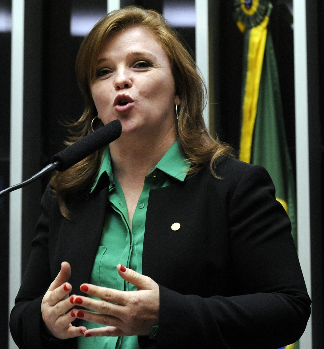 Leandre em março de 2016.